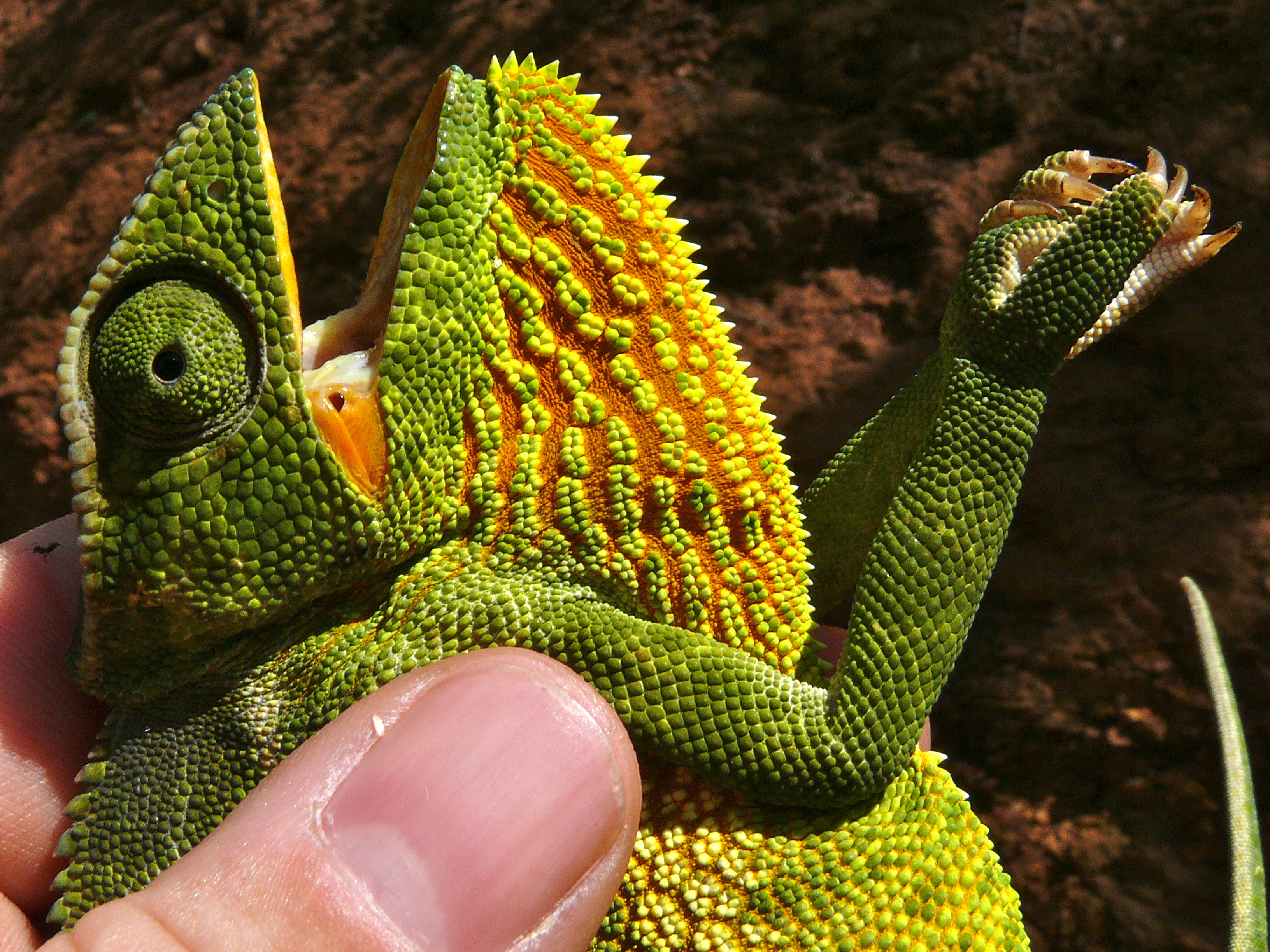 Road to Masindi, UGANDA